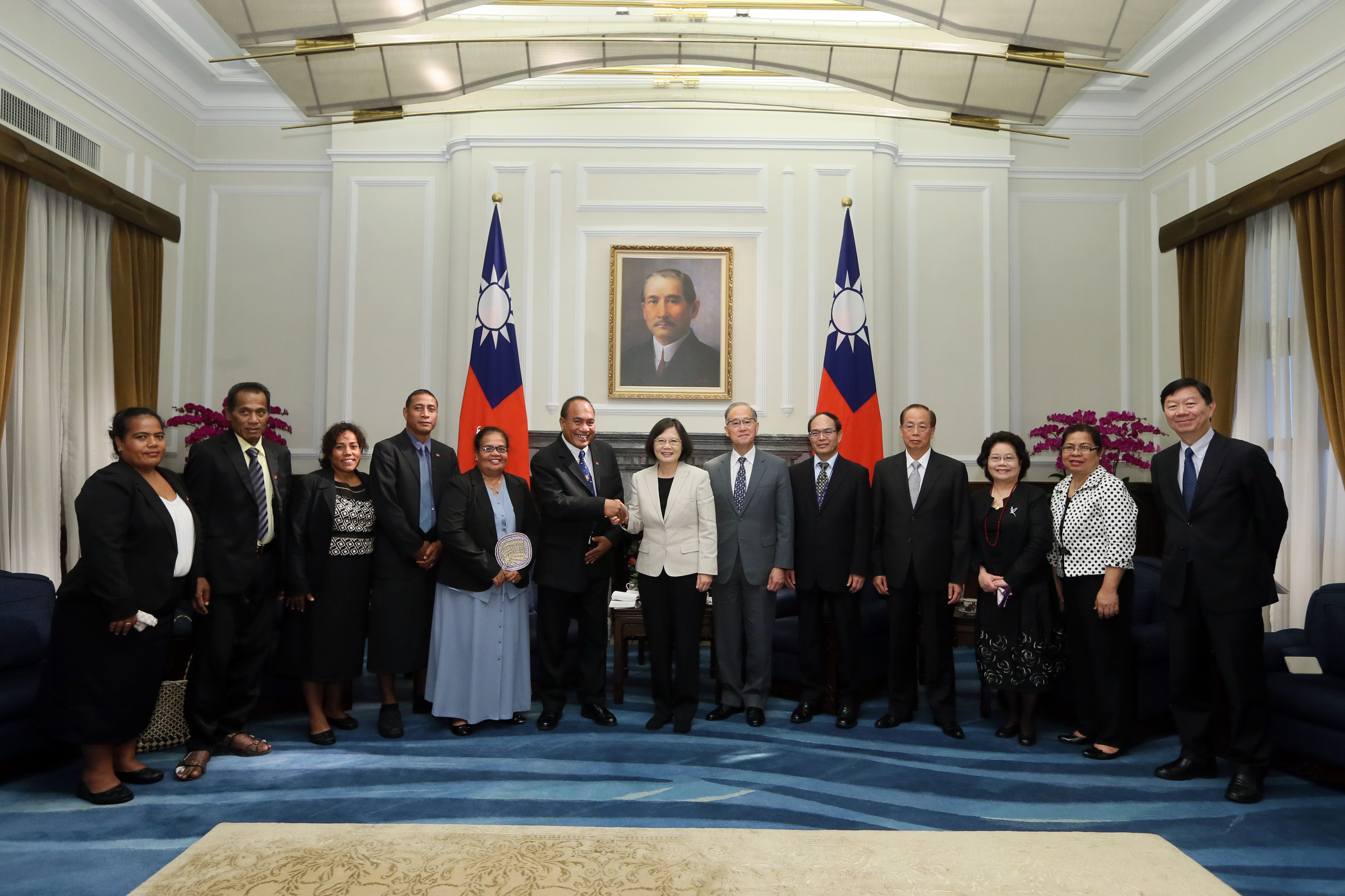 五月二十三日總統接見吉里巴斯總統馬茂(Taneti Maamau)伉儷乙行